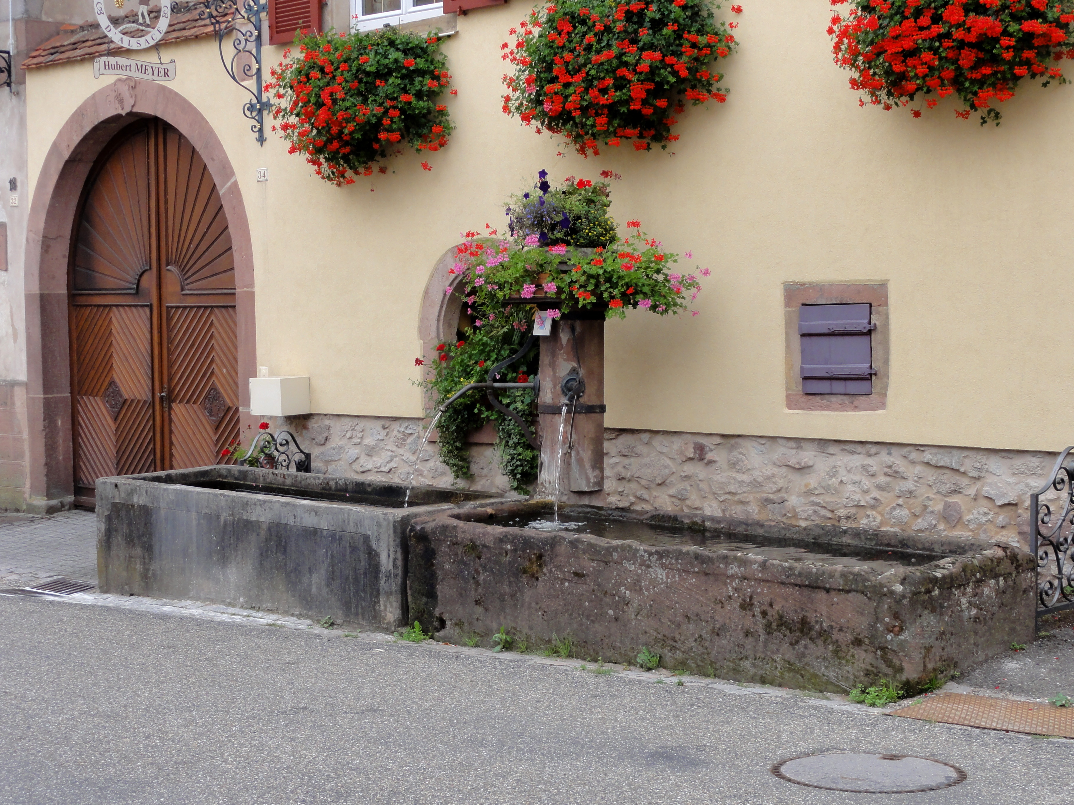 Alsace, Bas-Rhin, Blienschwiller, Fontaine, route des Vins.